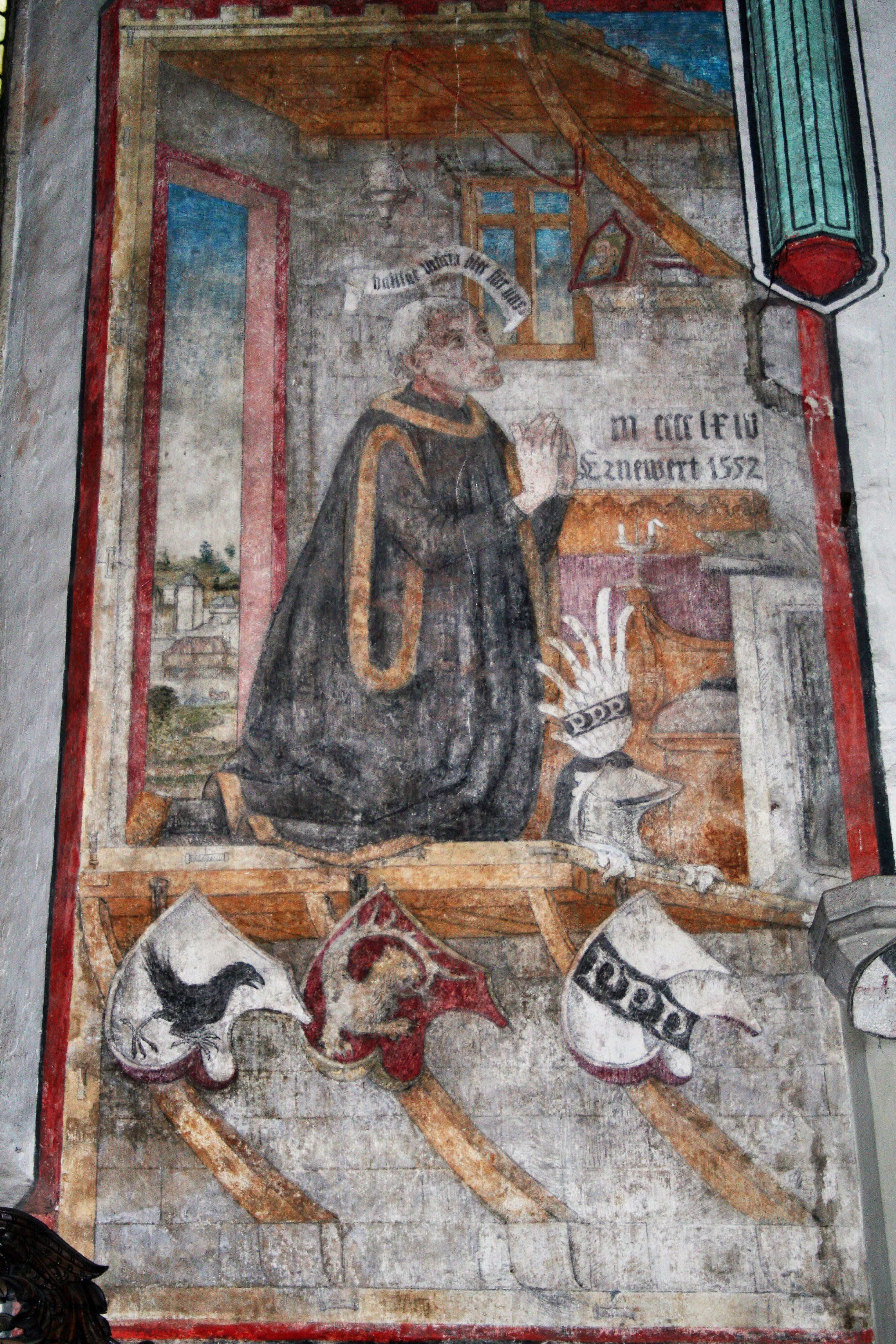 Fresko um 1460 aus der Memminger Schule, Fresko des großen Kirchenstifters Vöhlin